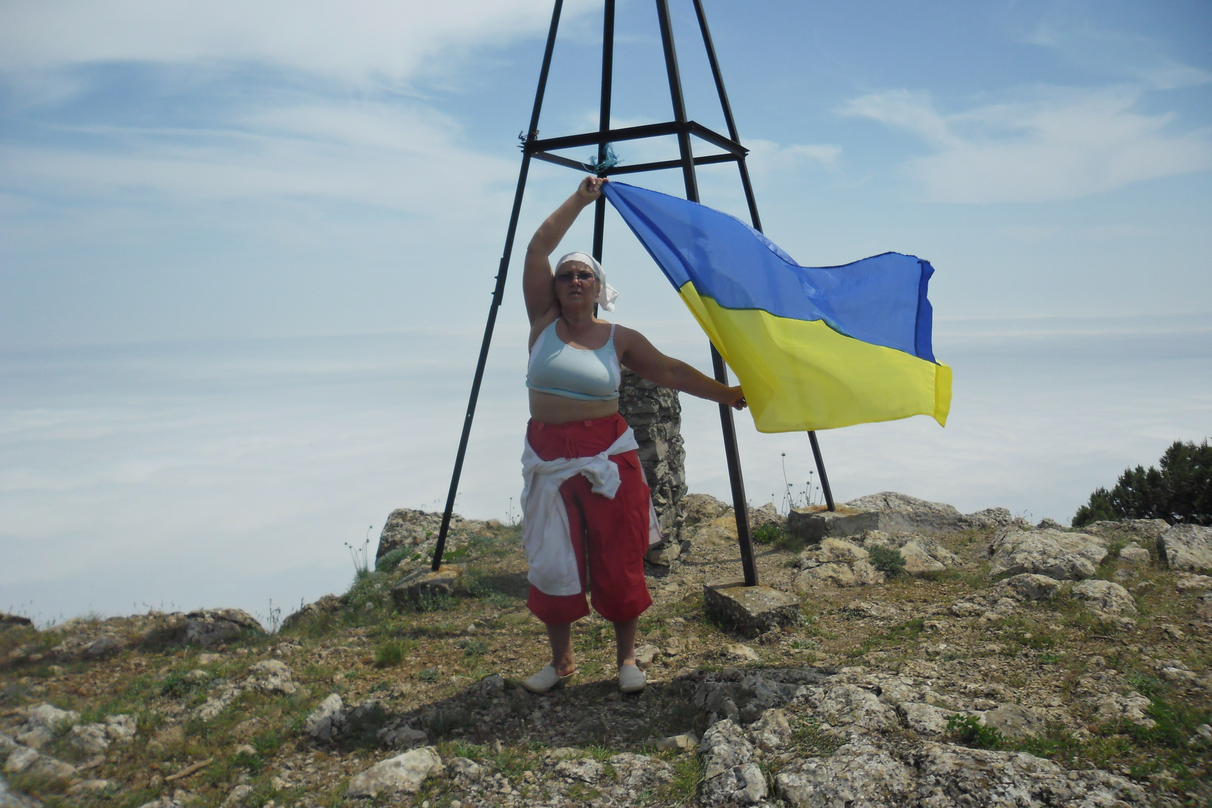 Фото